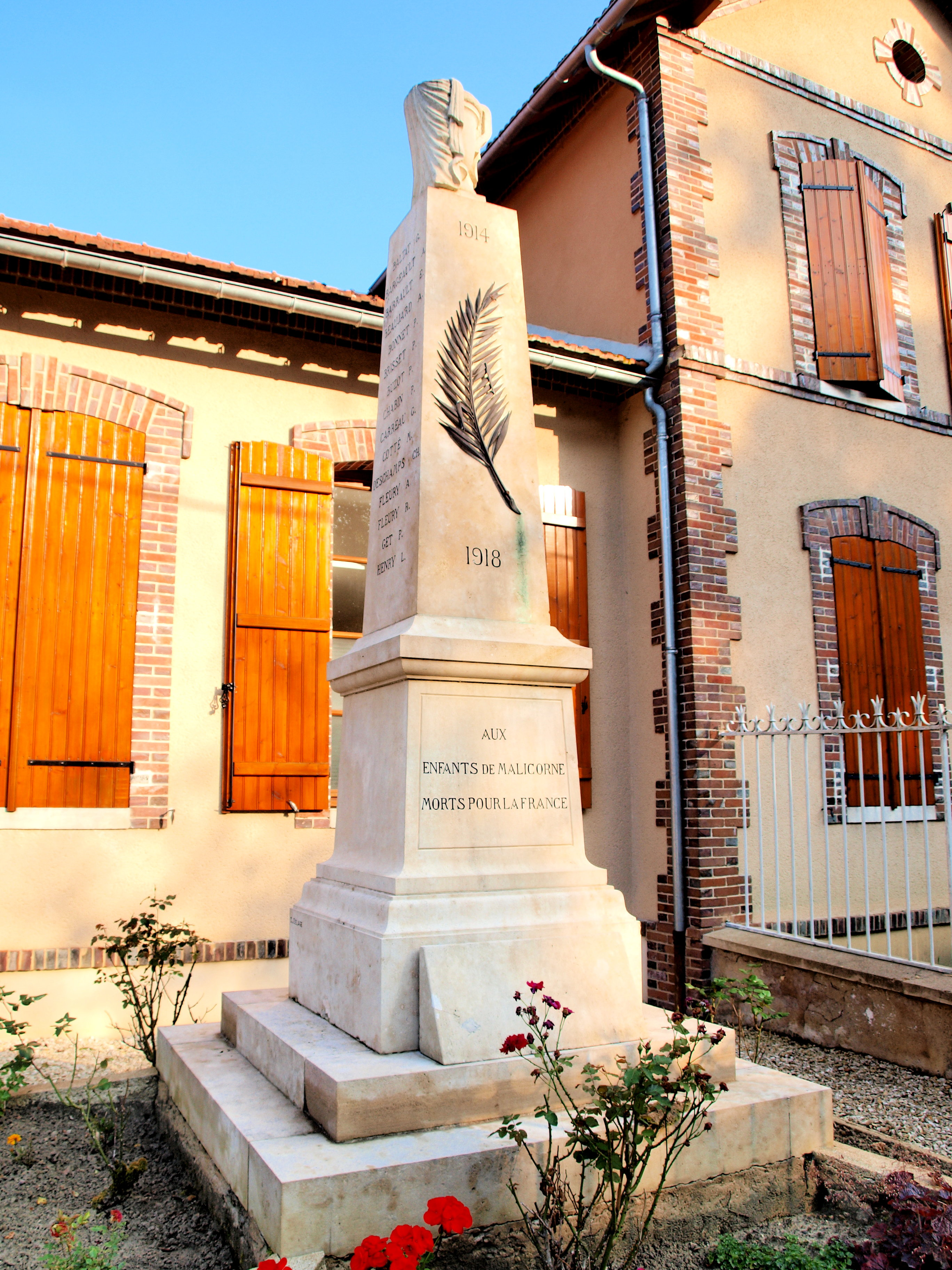 Malicorne (Yonne, France) ; monument aux morts